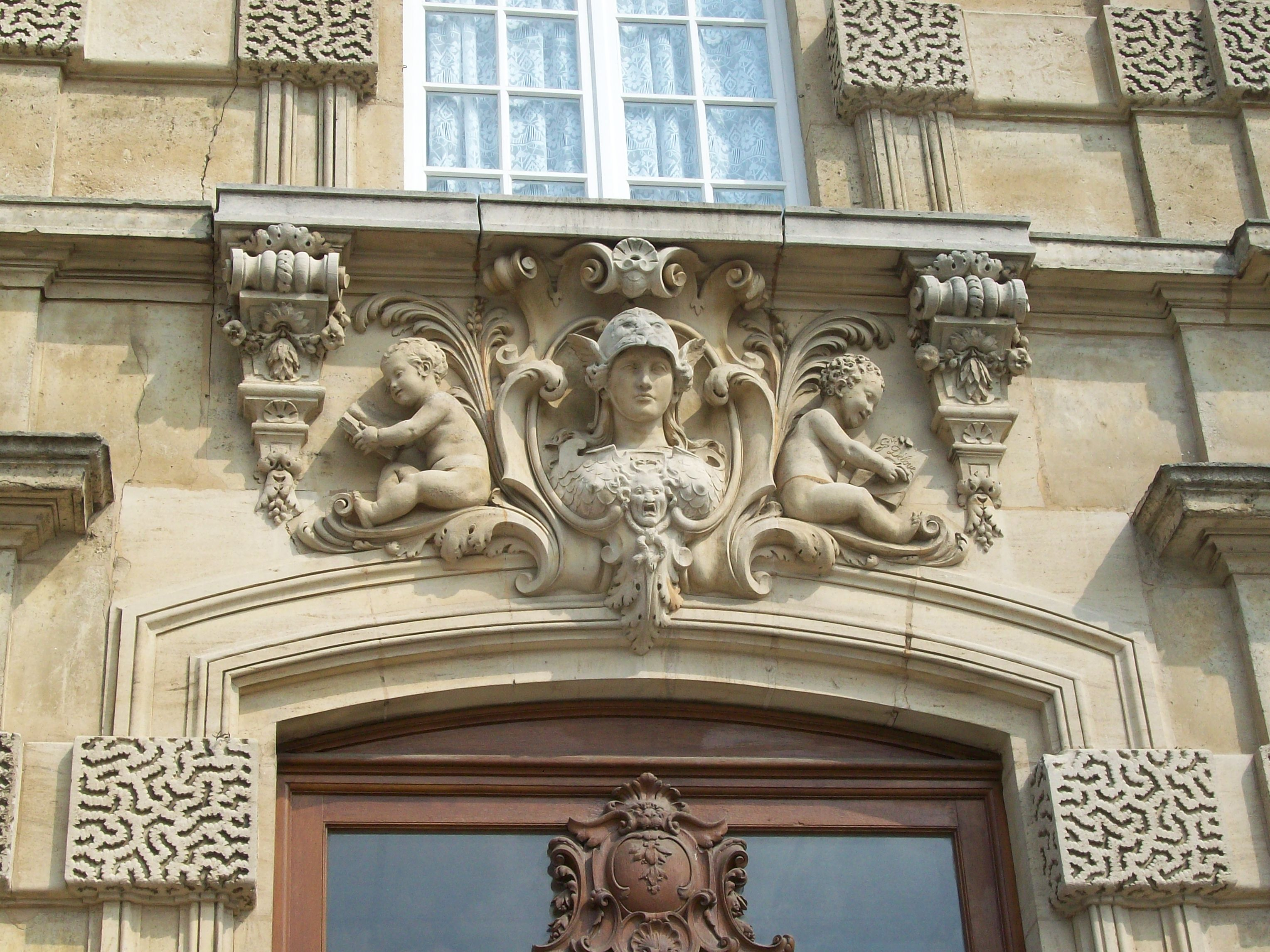 Construit en 1884, il fait partie du Patrimoine de la ville de Sedan — classée Ville d'Art et d'Histoire.